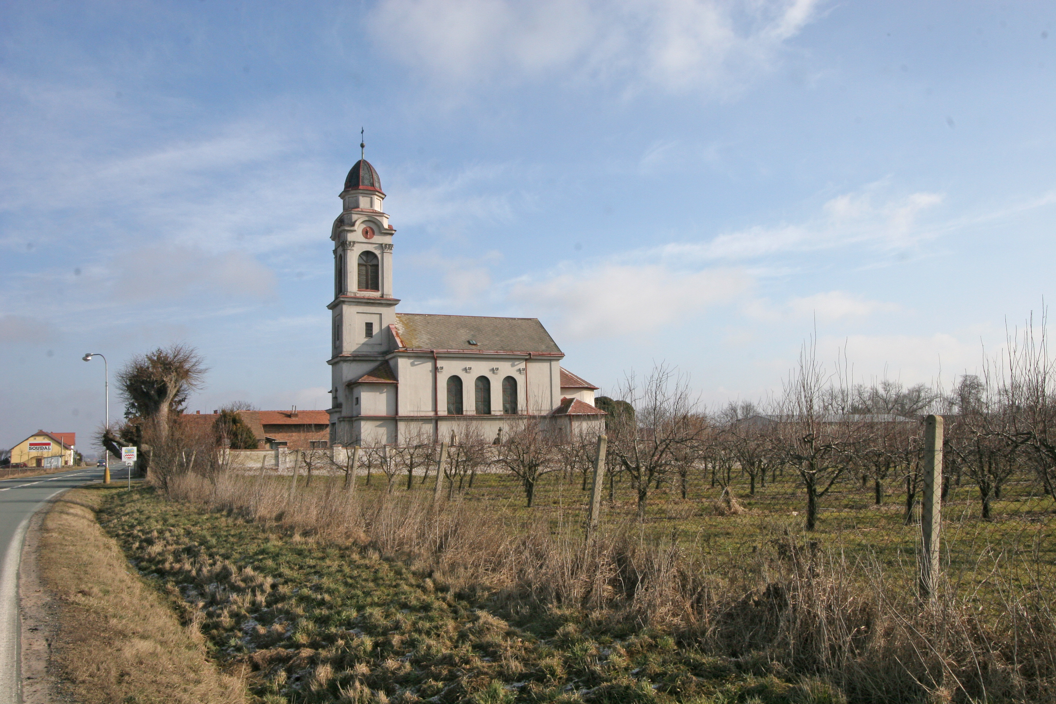 Podůlšany kostel sv. Miluláše